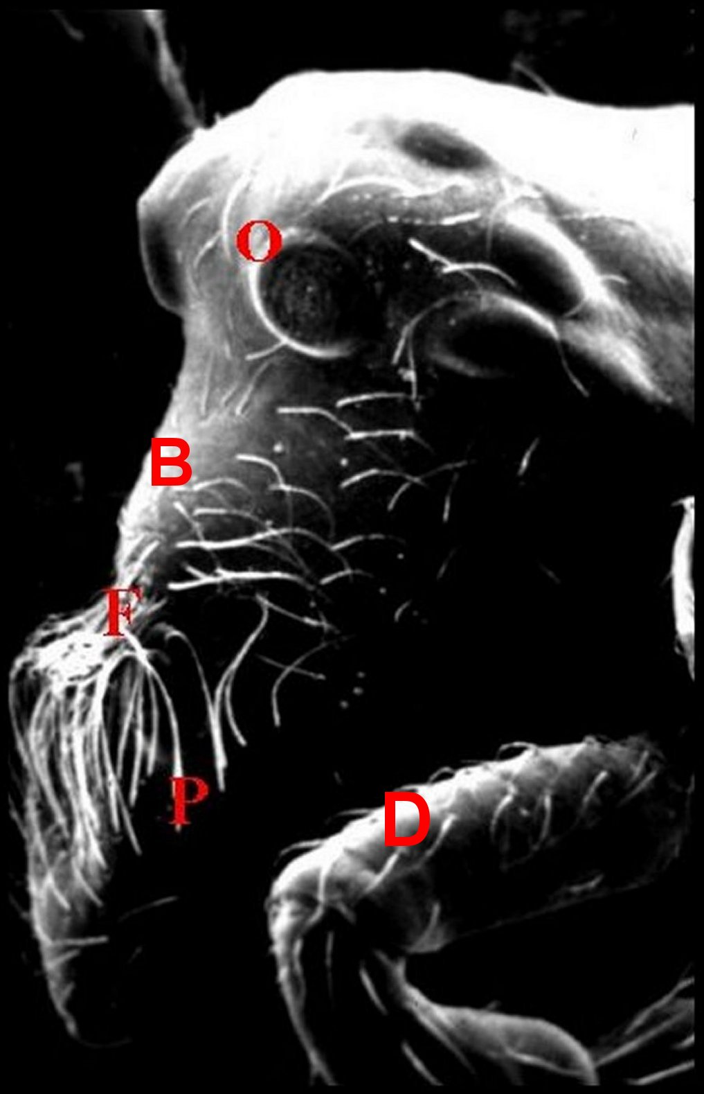 Mâle type d' Argyrodes benedicti, prosome, vu au microscope électronique à balayage.